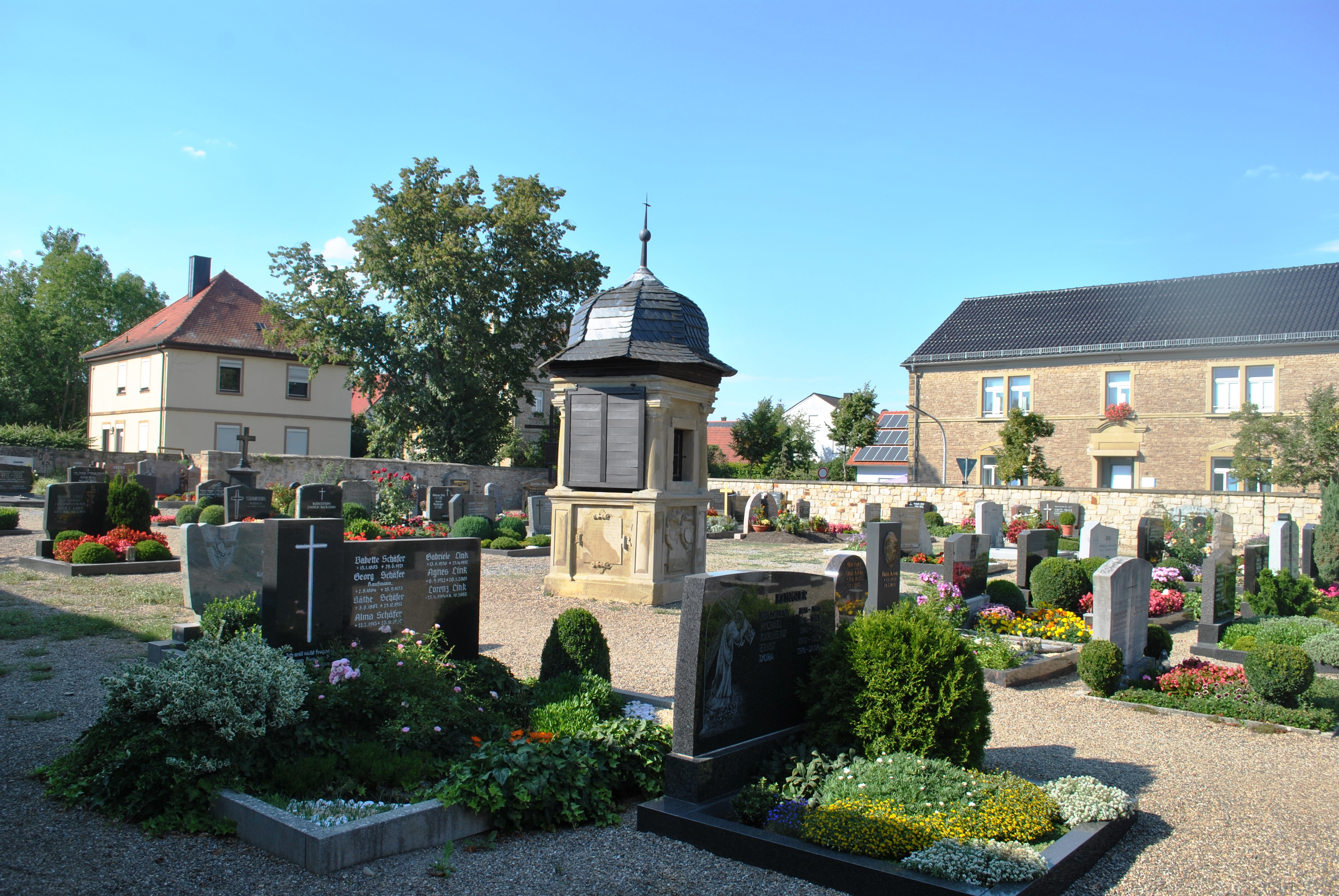 Friedhof angelegt 1542, erweitert 1588, Predigtkanzel 1659This is a photograph of an architectural monument.